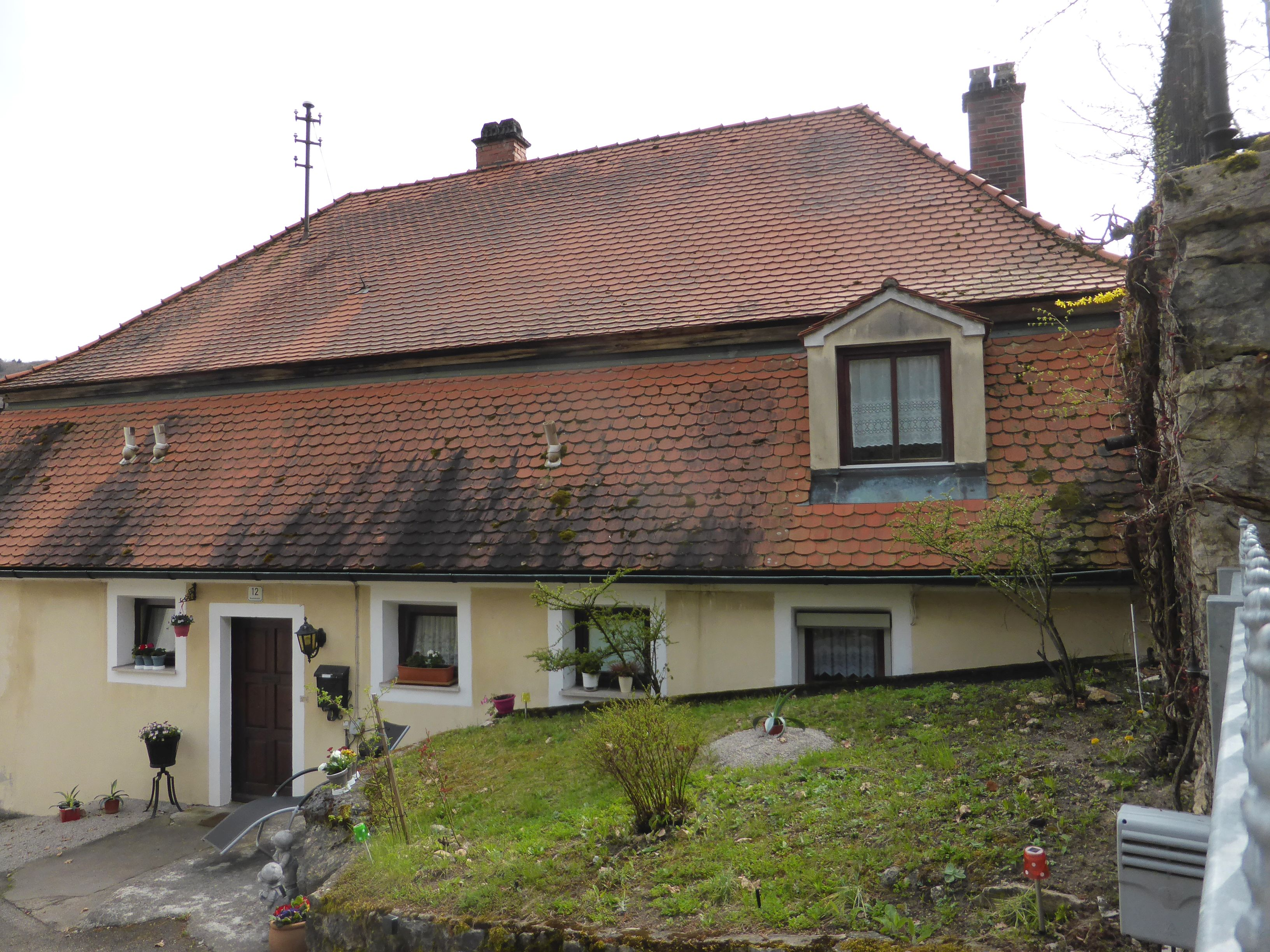 Neuenkehrsdorf 11 (Riedenburg)